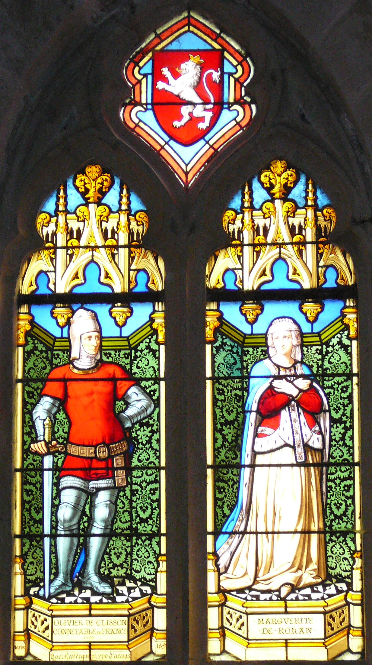 Olivier de Clisson and his spouse Marguerite, Basilique Notre Dame du Roncier, Josselin, France